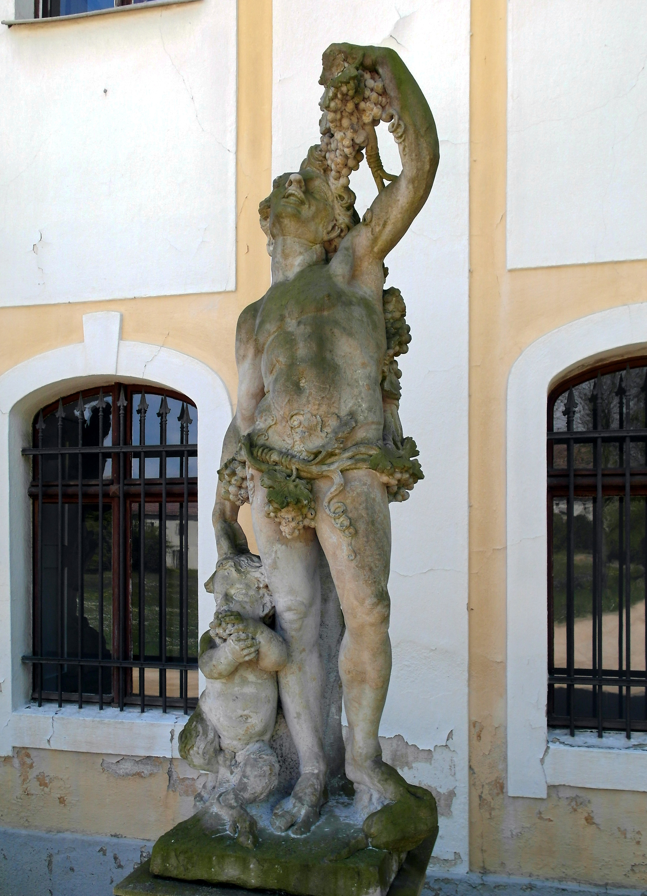 06.05.2016 02699 Königswartha: Schloß (GMP: 51.307568,14.326858): Hofseite. Bacchus, Gott des Weins. Die Eingangsfront zieren sechs Sandsteinfiguren. Sie stammen aus der Werkstatt Balthasar Permosers und wurden dort vermutlich im ersten Viertel des 18. Jahrhunderts geschaffen. Sie gehörten ursprünglich zum Herrenhaus in Luga, wurden jedoch 1946 aus Furcht vor Zerstörung nach Königswartha gebracht. [SAM5681.JPG]20160606445DR.JPG(c)Blobelt